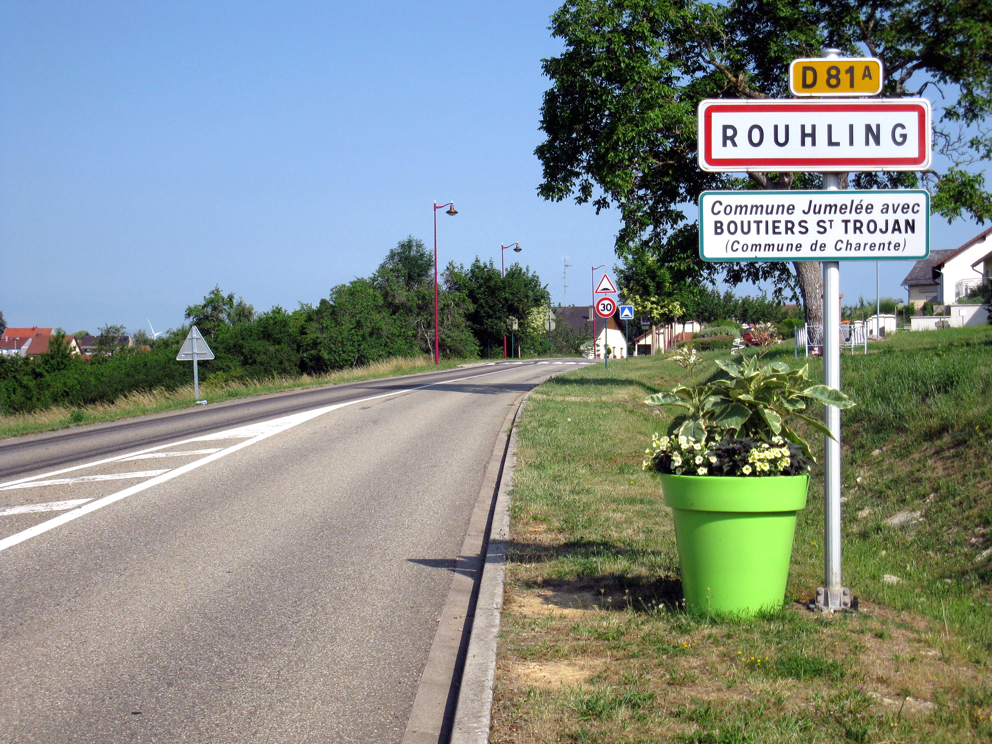 L'entrée du village en arrivant de Sarreguemines